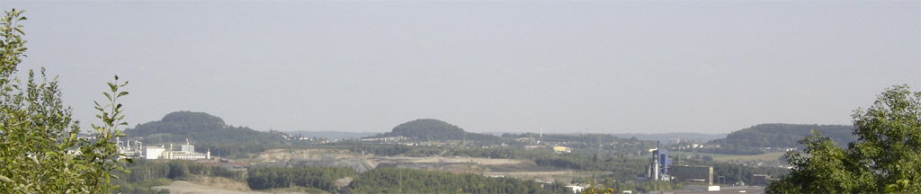 D'Bierger a Hiwwelen an der Gemeng Suessem. Ze gesinn, vu lénks no riets: Zolwerknapp, Loetschef an de Bieleser Gaalgebierg